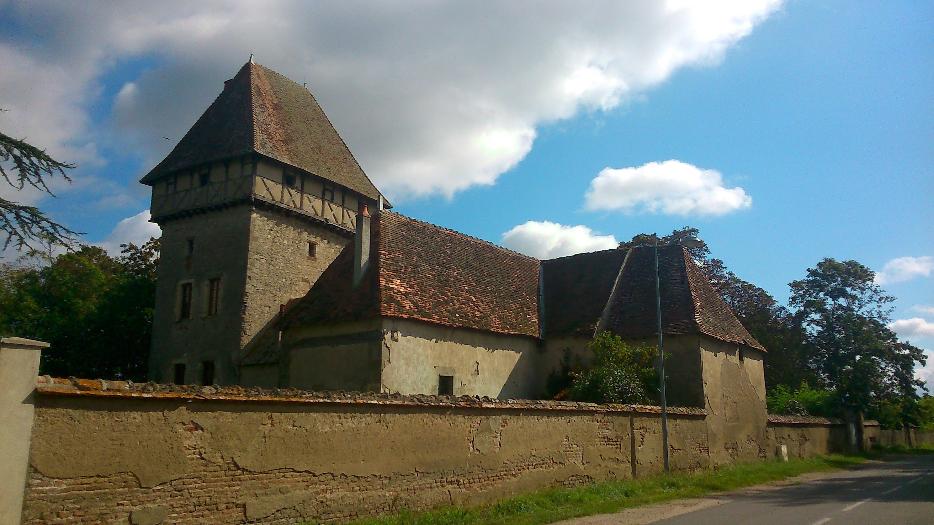 Prieuré-Donjon de La Ferté-Hauterive .